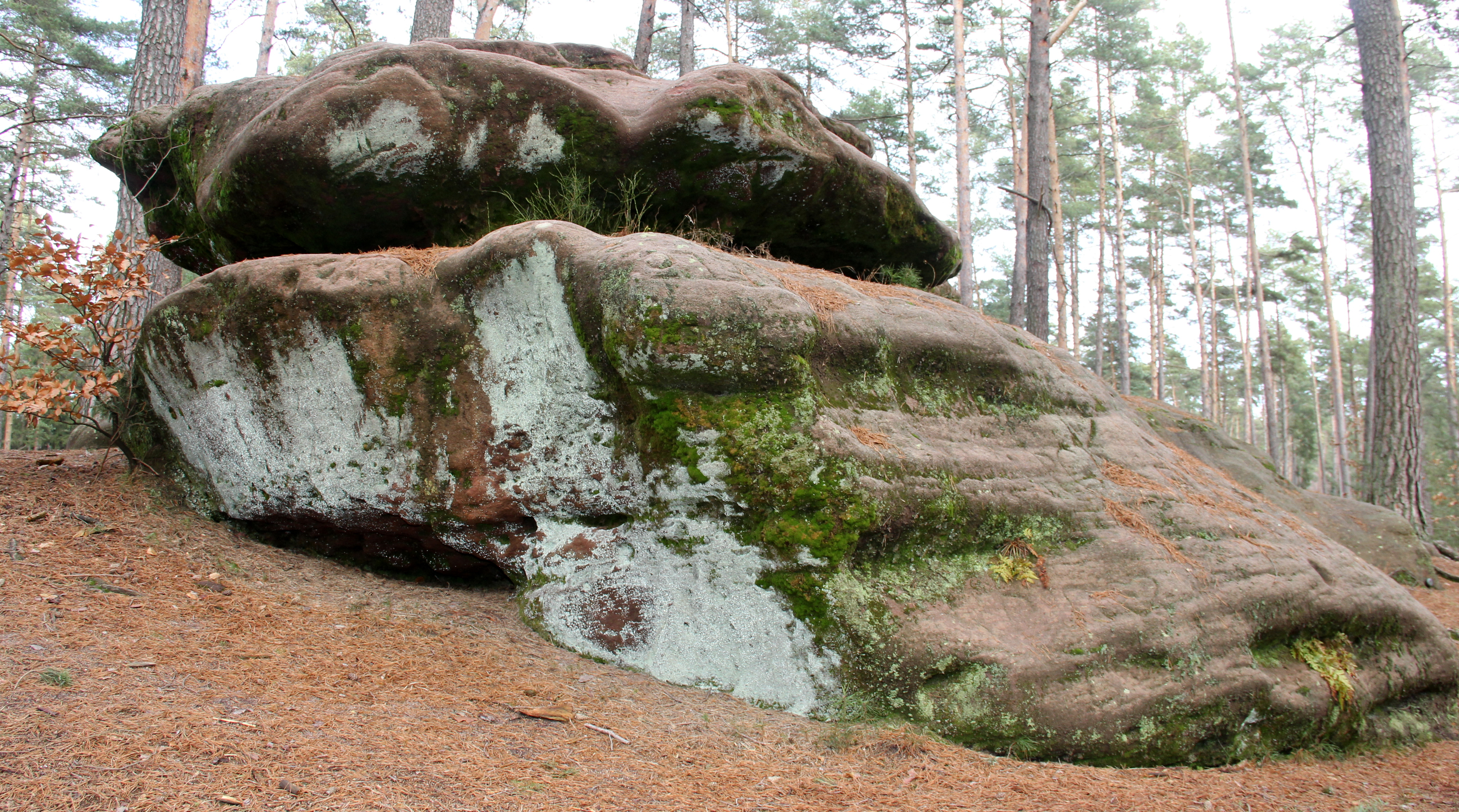 Schüsselstein (Fischbach b. Nürnberg)